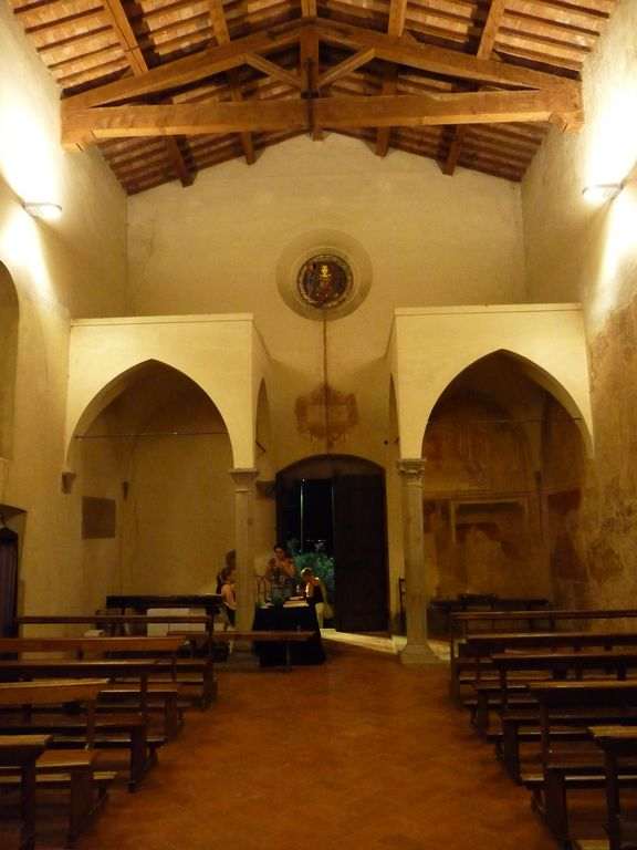 Montelupo Fiorentino (FI - Italia) - Prioria di San Lorenzo